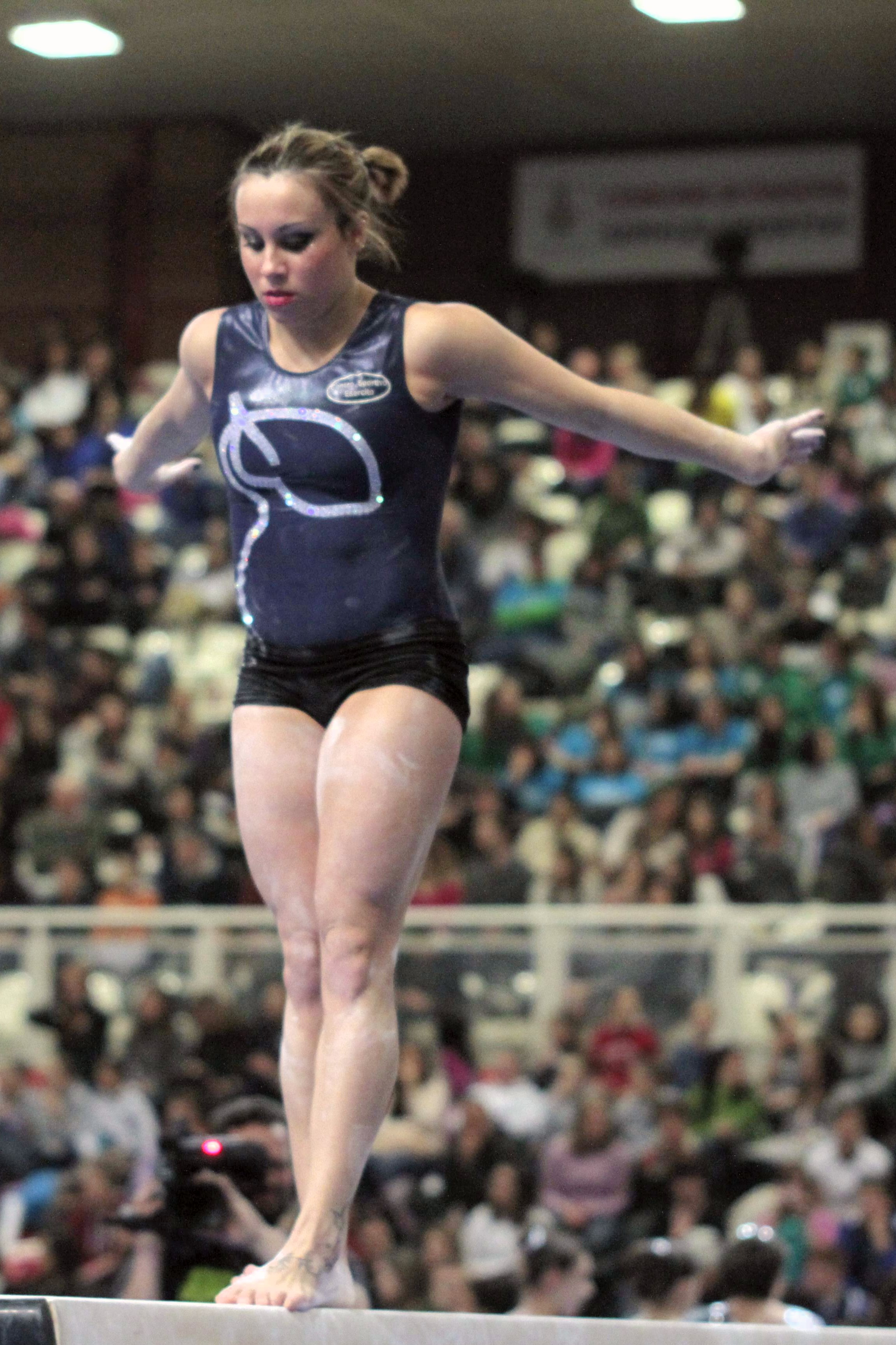 Vanessa Ferrari. Padova, 23 febbraio 2013